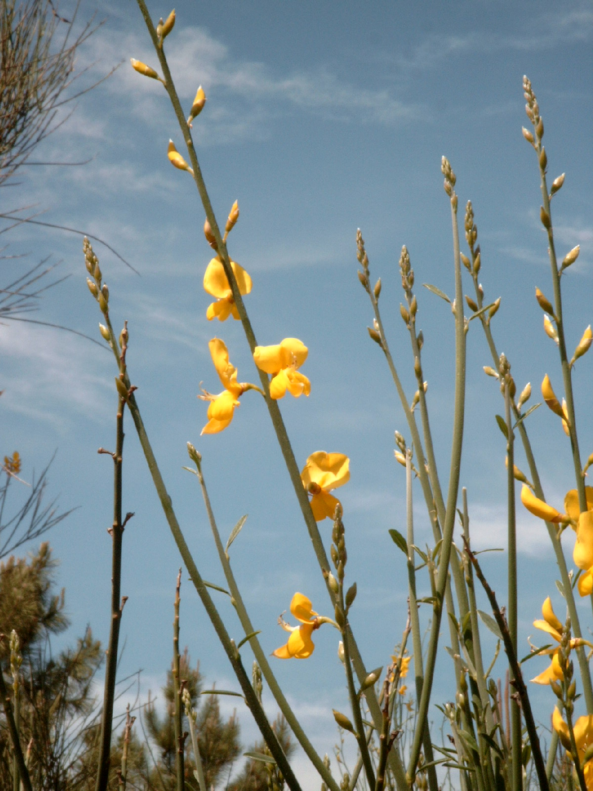 Spartium junceum, Algarve, Portugal.